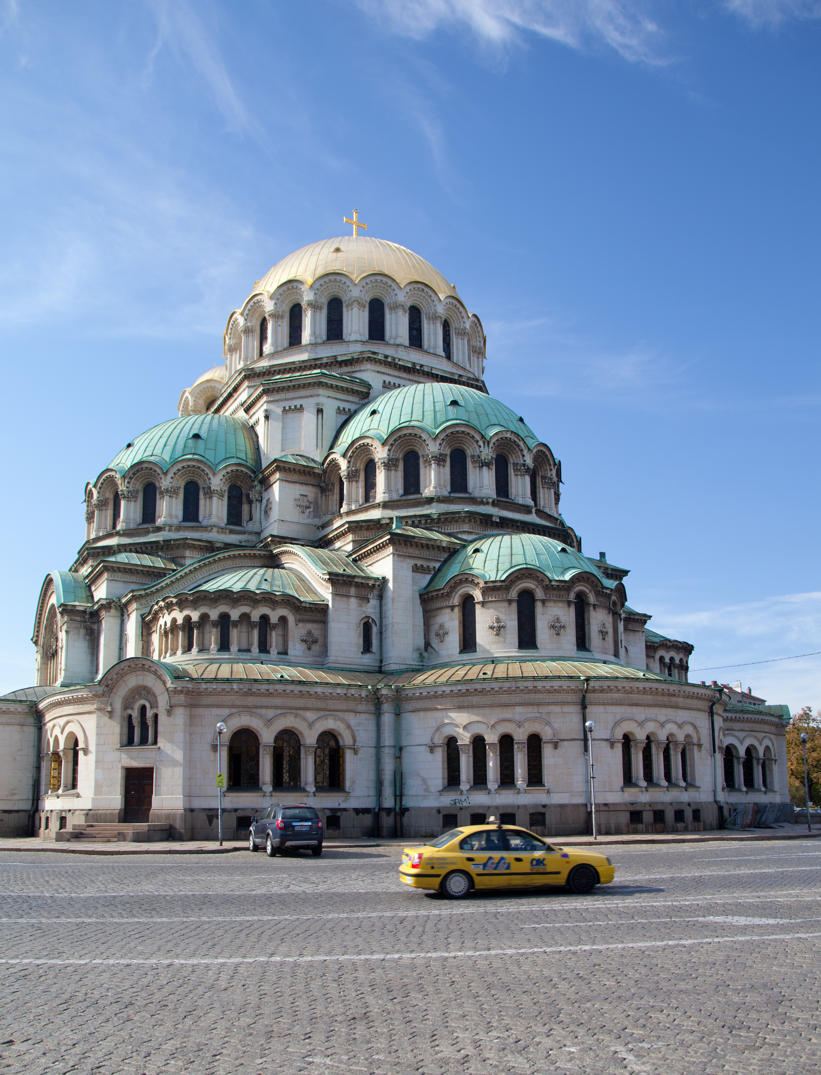 Sofia; Alexander-Newski-Kathedrale